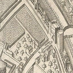 Holzschnitt: Gereonstor (1570)